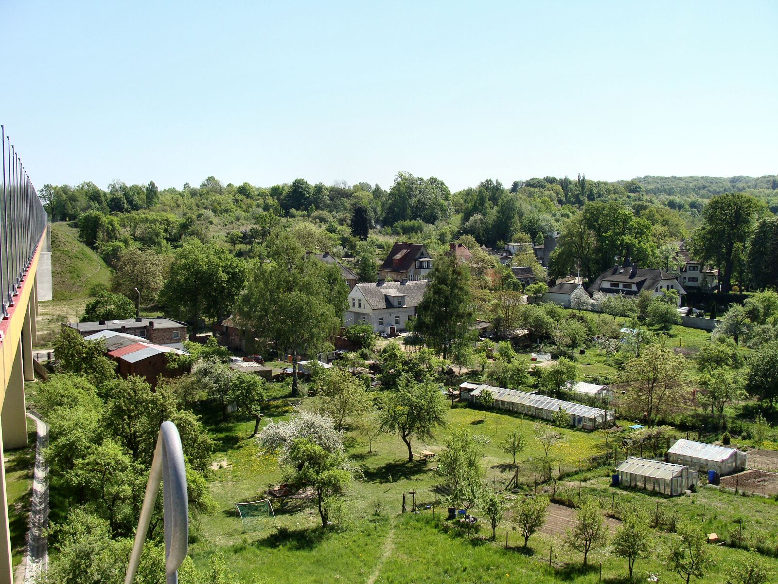 Widok na Klęskowo i Wzgórza Bukowe z wiaduktu autostrady w Szczecinie Klęskowie